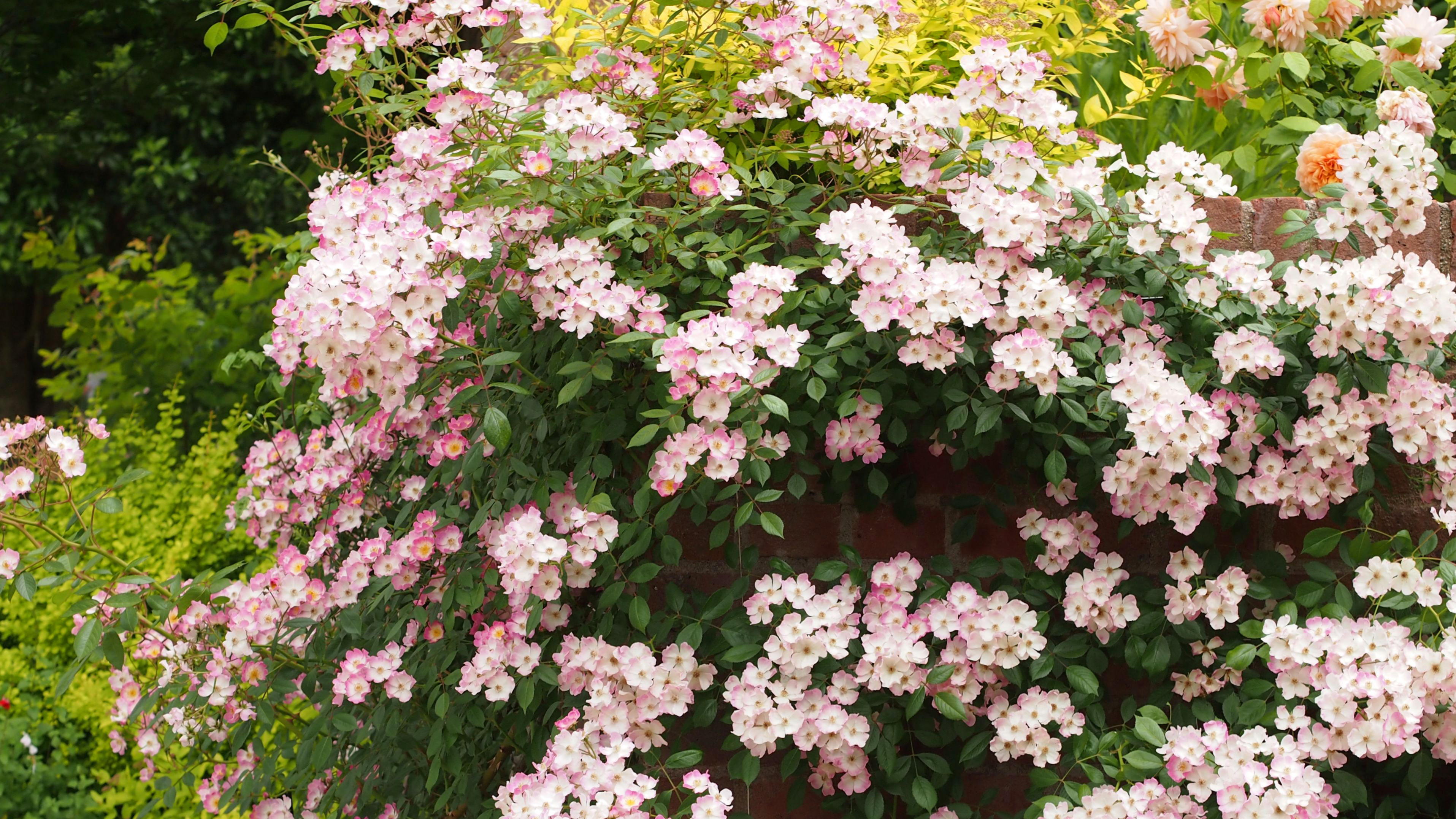 Rose, Ballerina, バラ, バレリーナ, Shrub rose シュラブ United Kingdom イギリス Bentall 1937